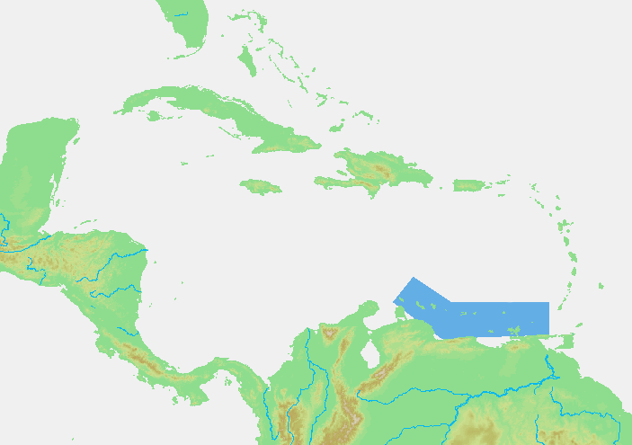 Caribbean - Benedenwindse eilanden.PNG